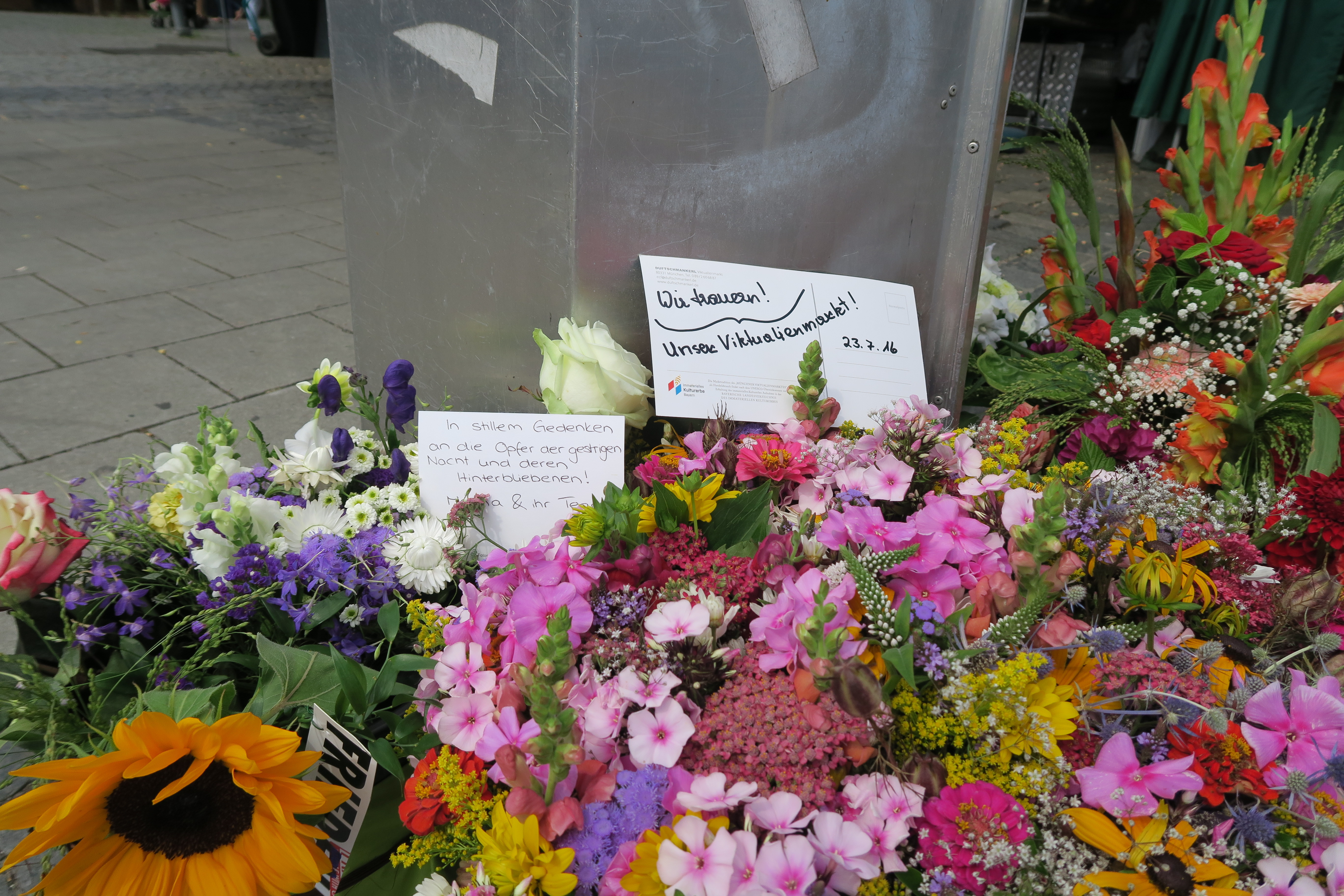 Kondolenzen wegen des Amoklaufs in München am 22. Juli 2016